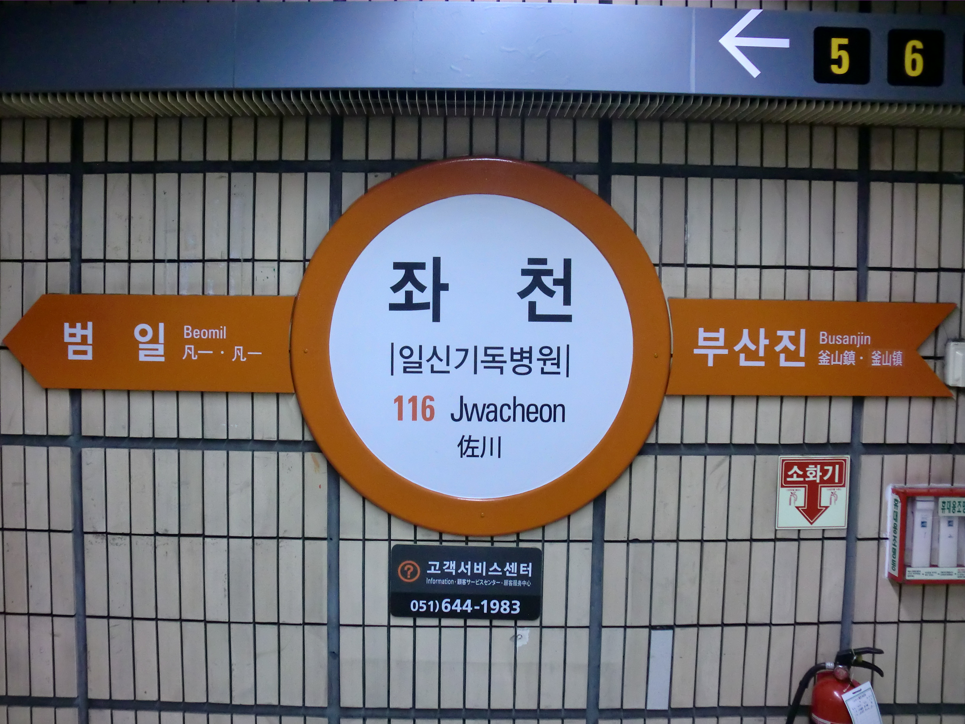 부산도시철도 1호선 좌천역의 역명판